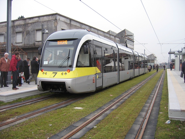 Tram TEB